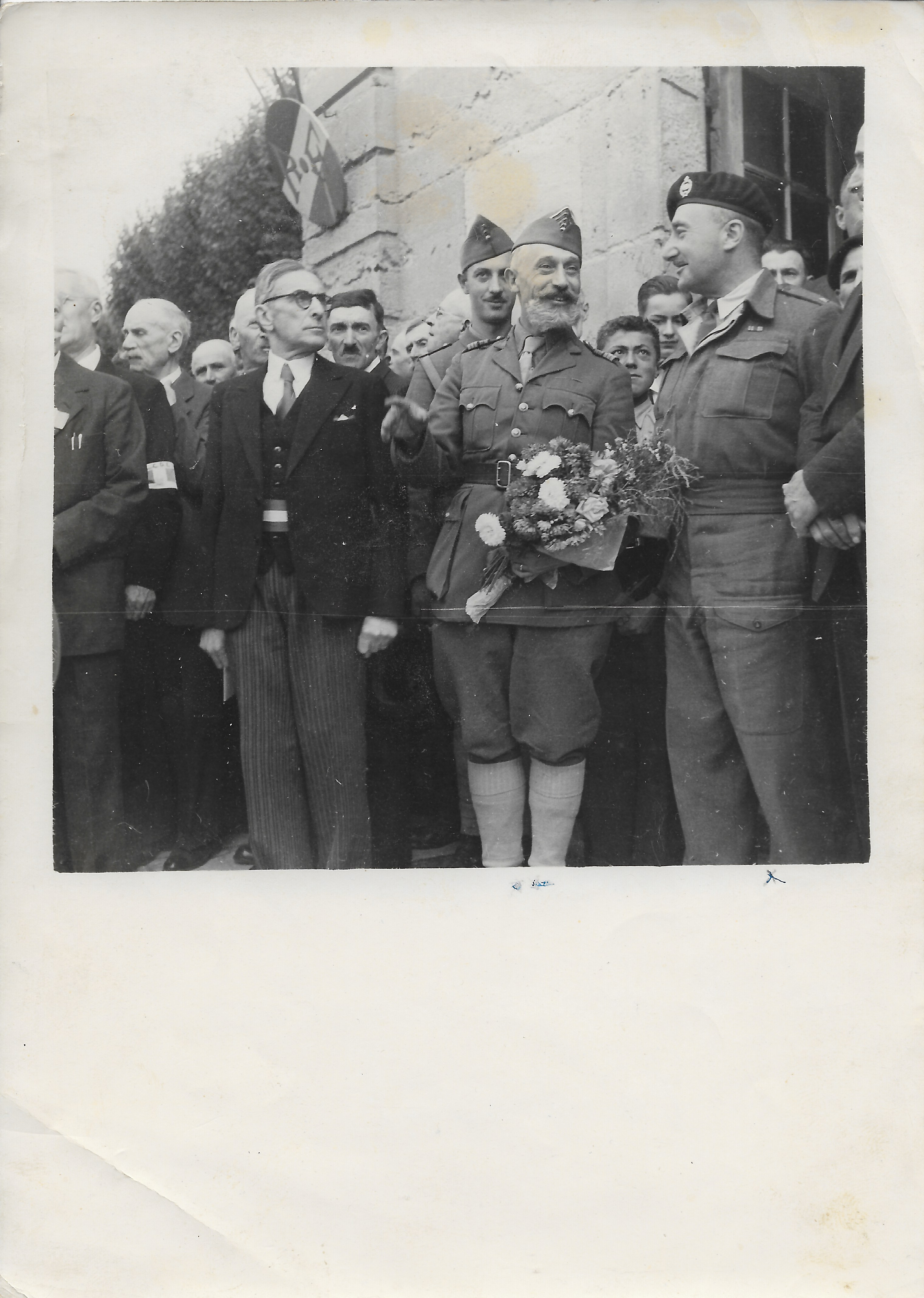 Edmond Proust (colonel Chaumette), le major Whitty commandant la mission interalliés Jedburgh Harold. devant la mairie de Saint-Maixent en septembre 1944. Centre Régional Résistance & Liberté